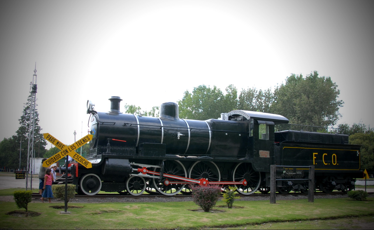 Reliquia histórica en la estación de la ciudad de Marcos Paz.